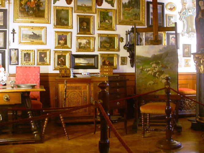 Braith Mali Künstlerateliers im Braith-Mali-Museum in Biberach/Riß.